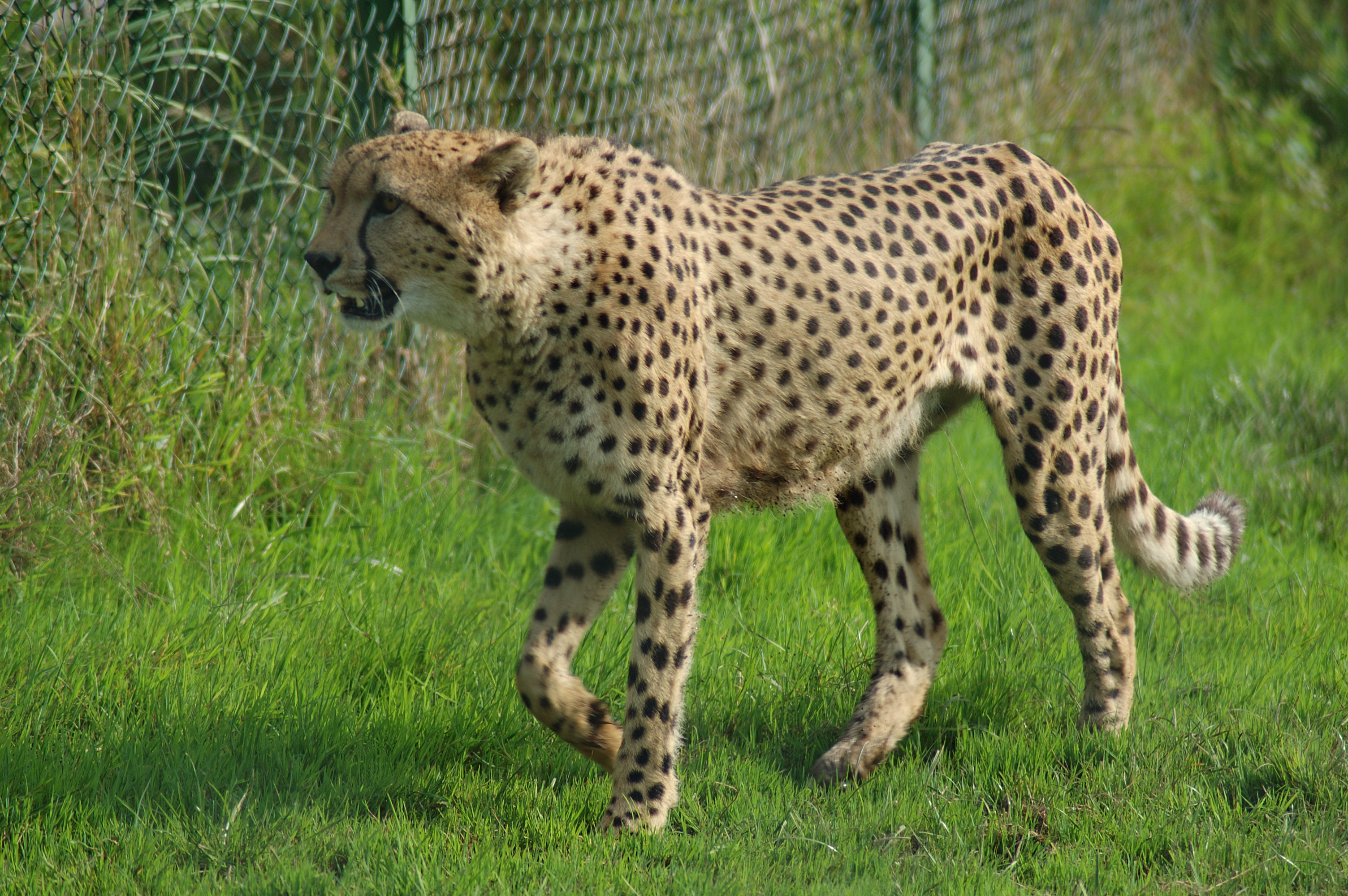 Cheetah / Guépard (Acinonyx jubatus)